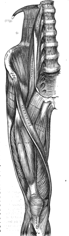 Músculos da região ilíaca anterior e femoral anterior.